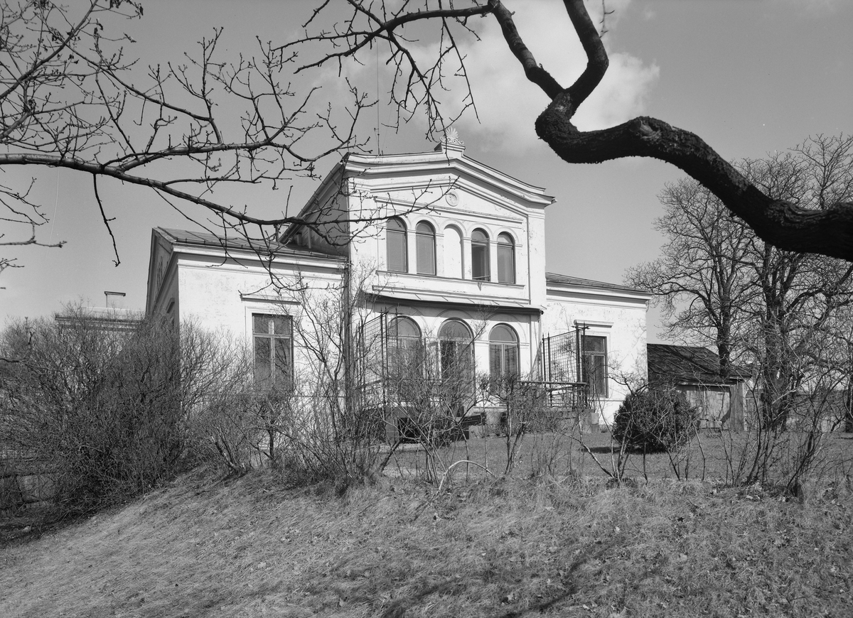 Framnes løkkeeiendom, Oslo. Foto: Truls Teigen / Oslo Museum